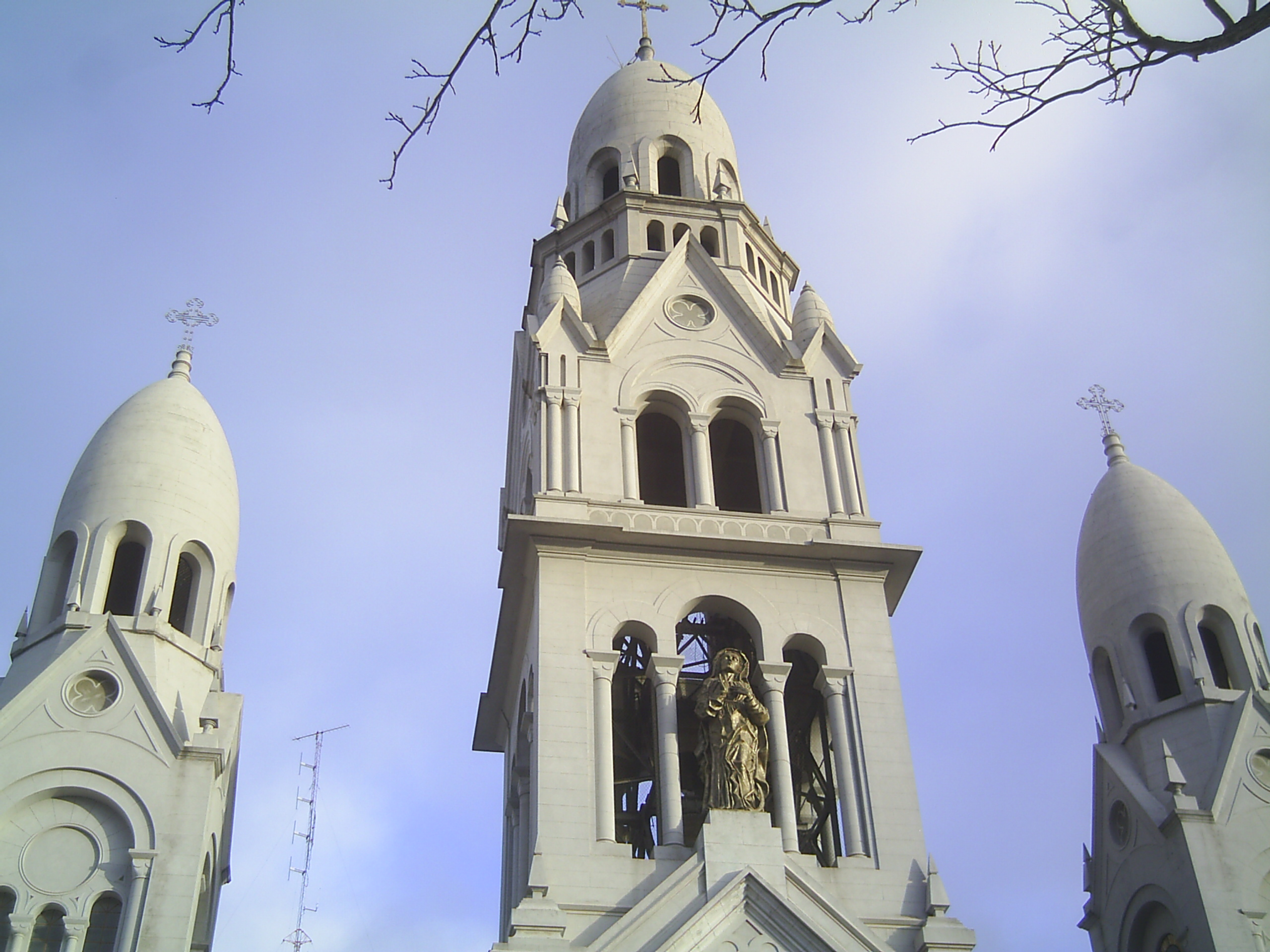 Iglesía del Santísimo Sacramento de Tandil